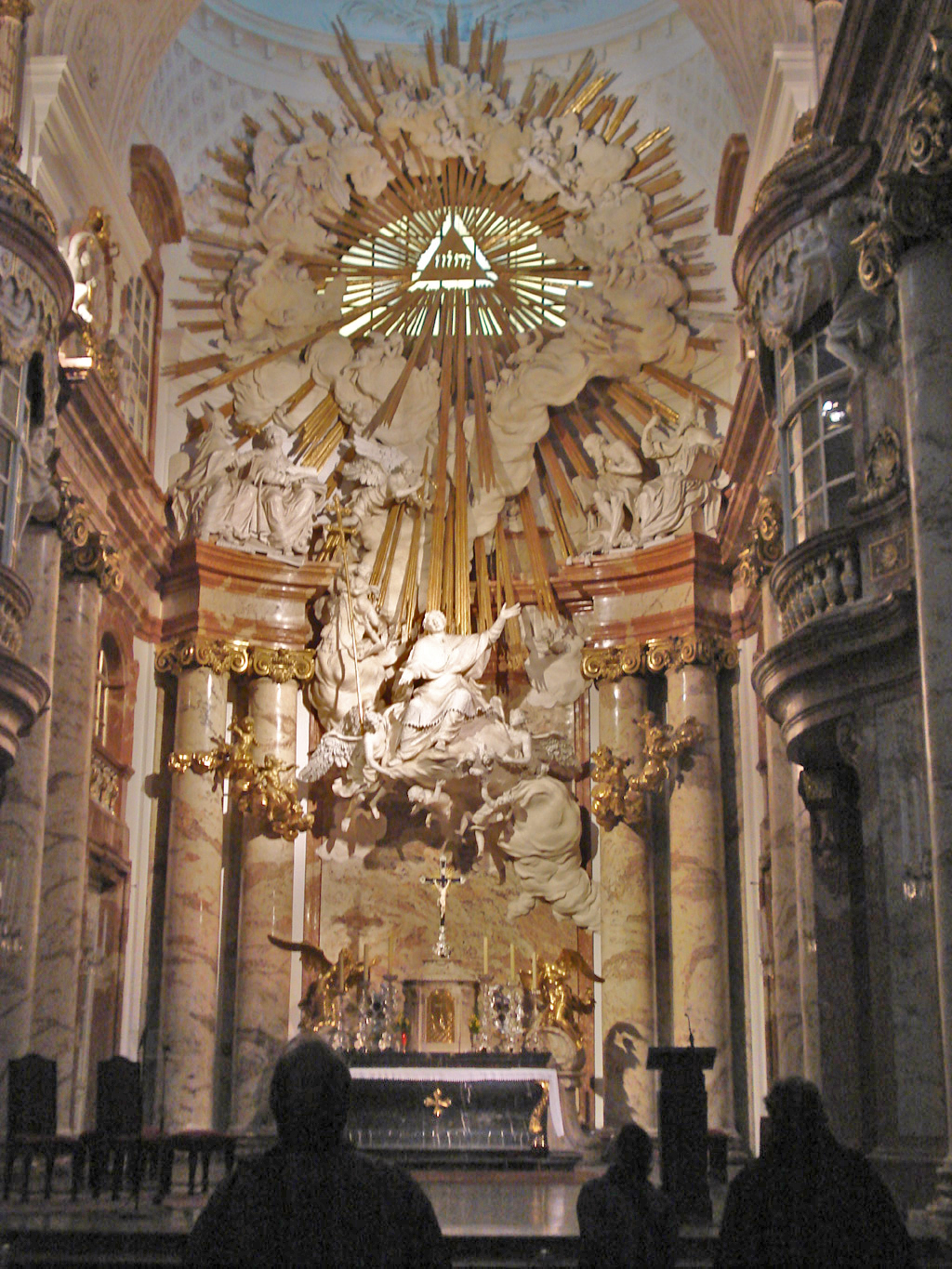 Dëst Bild weist den Haaptaltoer an der Wiener Karelskierch. Ze gesinn ass hei hannert dem hebräeschen JHWH-Tetragramm déi ronn Fënster, duerch déi den Altoer an engem giele Liicht erschéngt.